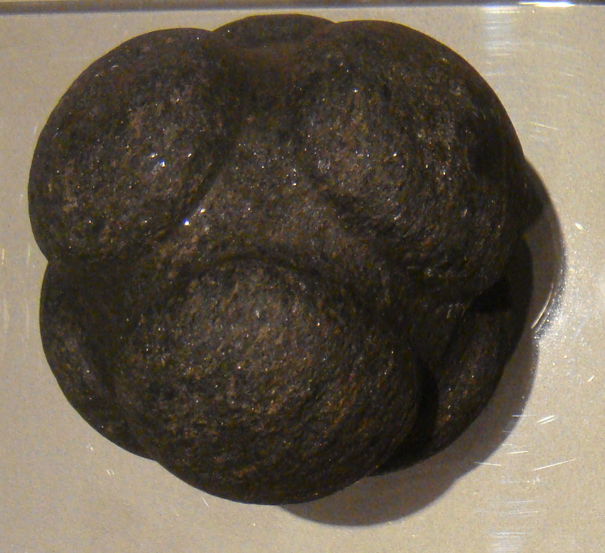 Kelvingrove Art Gallery and Museum de Glasgow. Salas de Prehistoria humana.